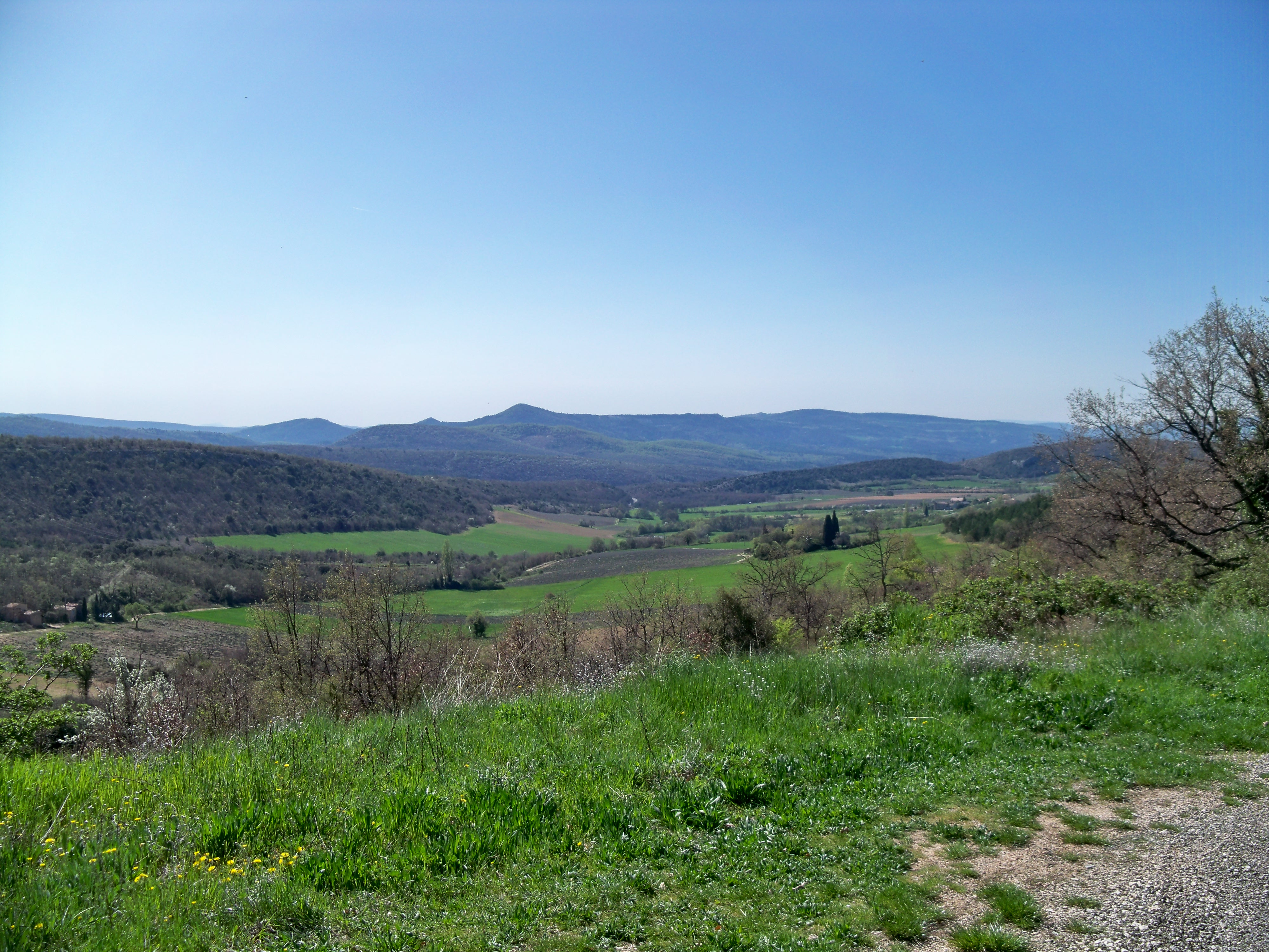 Plaine près de Montsalier (04)